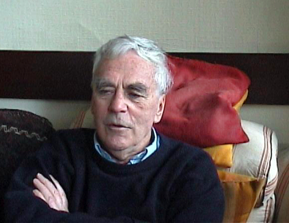 Dutch writer J.J. Voskuil (schrijver)